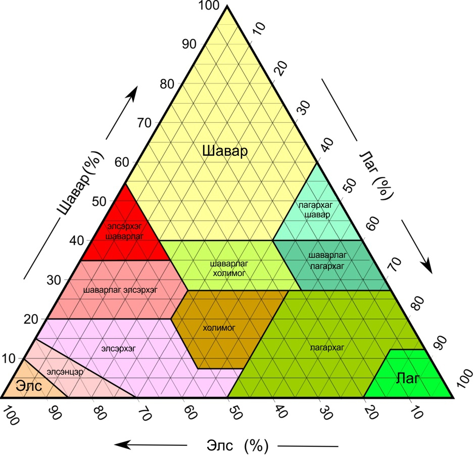 Монгол: Хөрсний текстур, АНУ-ын ХАА-ны ангилал